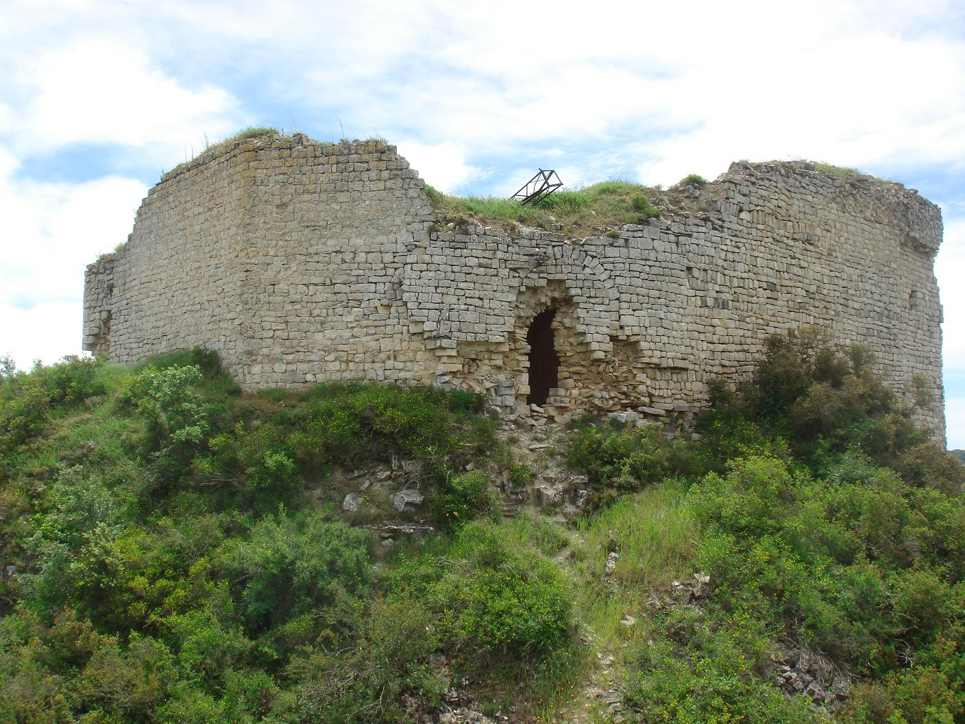 Castell de La Guàrdia Lada vist des de l'ermita de Nostra Senyora del Coll